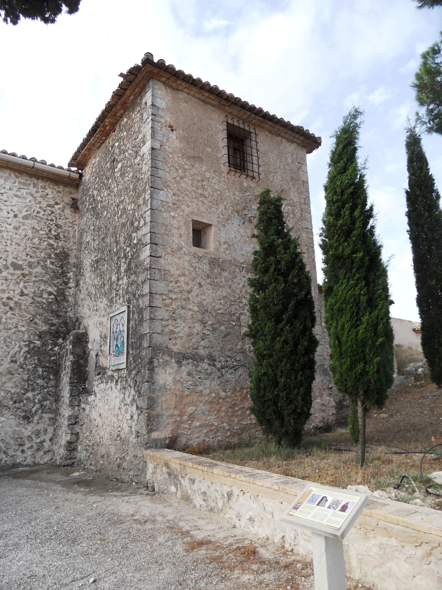 Torre del Conjurador, l'única restant de l'antic castell d'Almiçrà, adossada a l'ermita de Sant Bartomeu.